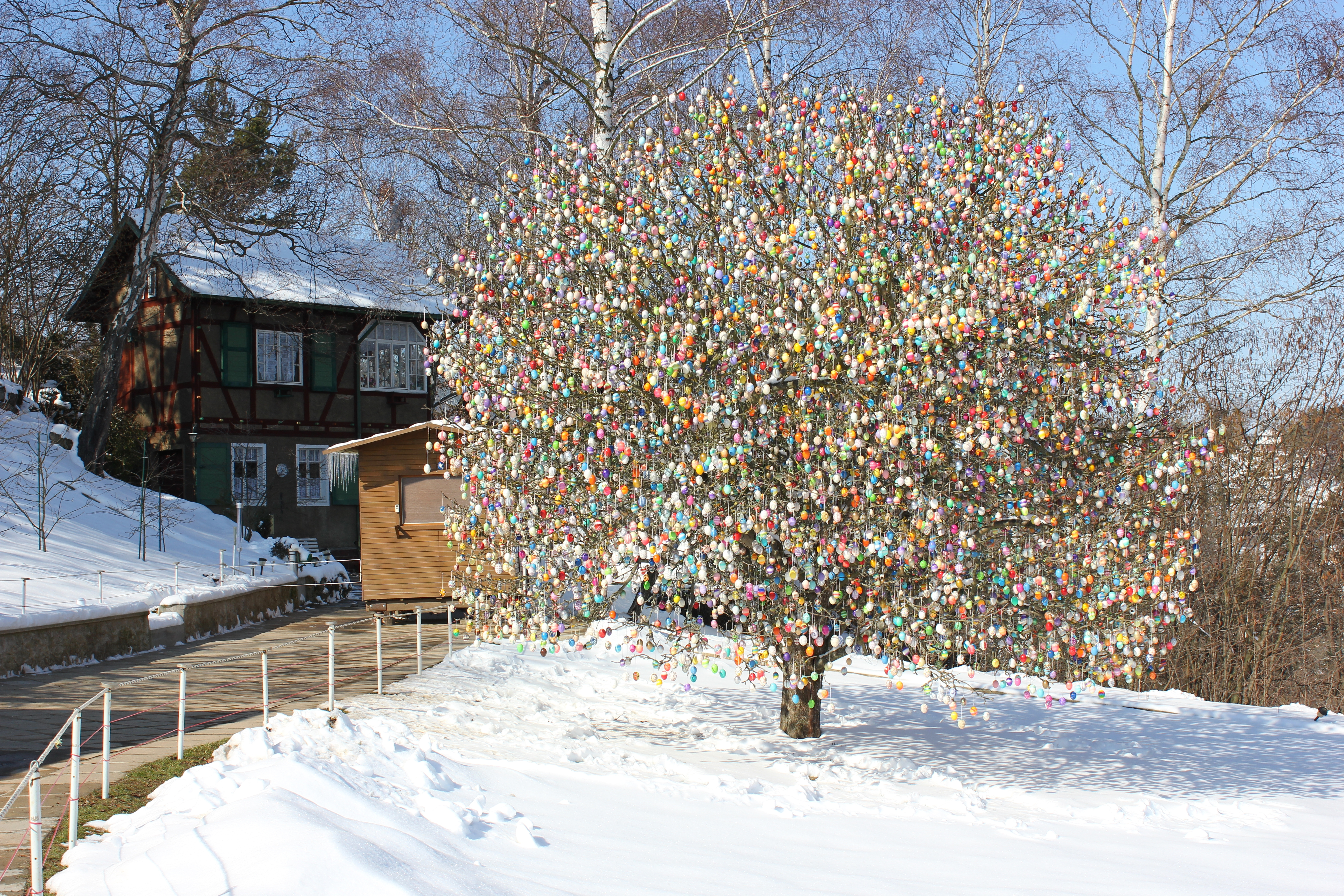 Ostereierbaum (ein Apfelbaum) mit 10 000 Eier im Garten von Volker und Christa Kraft in Saalfeld. Aufgenommen im Jahr 2013. Wurde zum Oster von 1965-2015 geschmuckt. Ab 2016 ist es Geschichte.